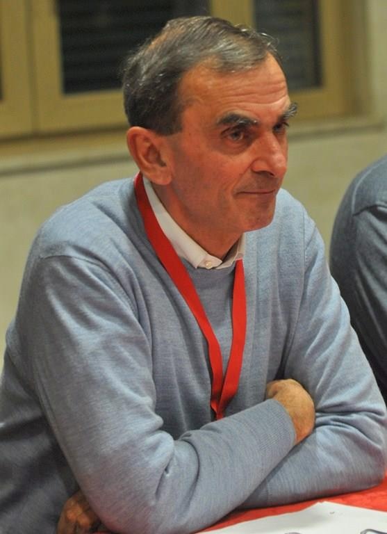 Franco La Torre - Festa della Legalità Partito Democratico - Firenze 16-17-18 novembre 2012. Sito